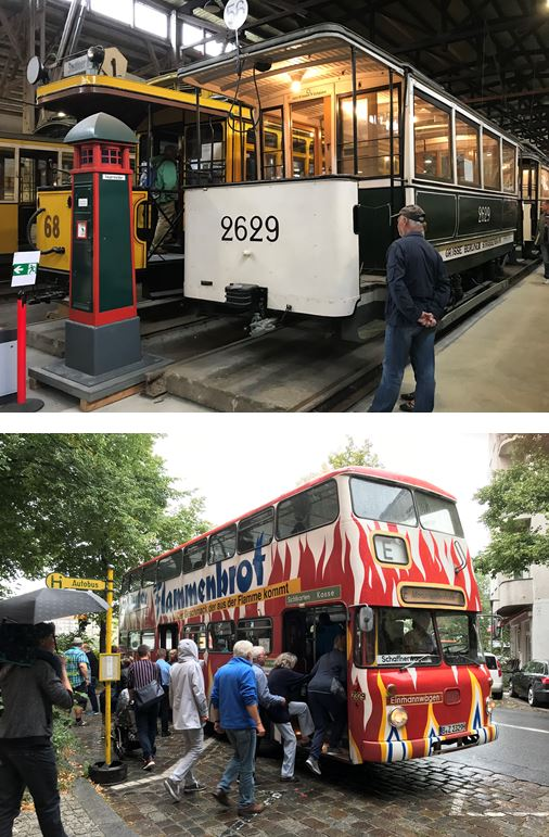 Blick in das Depot für Kommunalverkehr und Shuttle-Service mit historischen Bussen zwischen Depot und Museum an den Tagen der Offenen Tür.